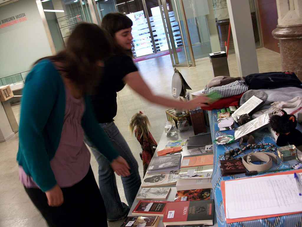 Truke azoka.